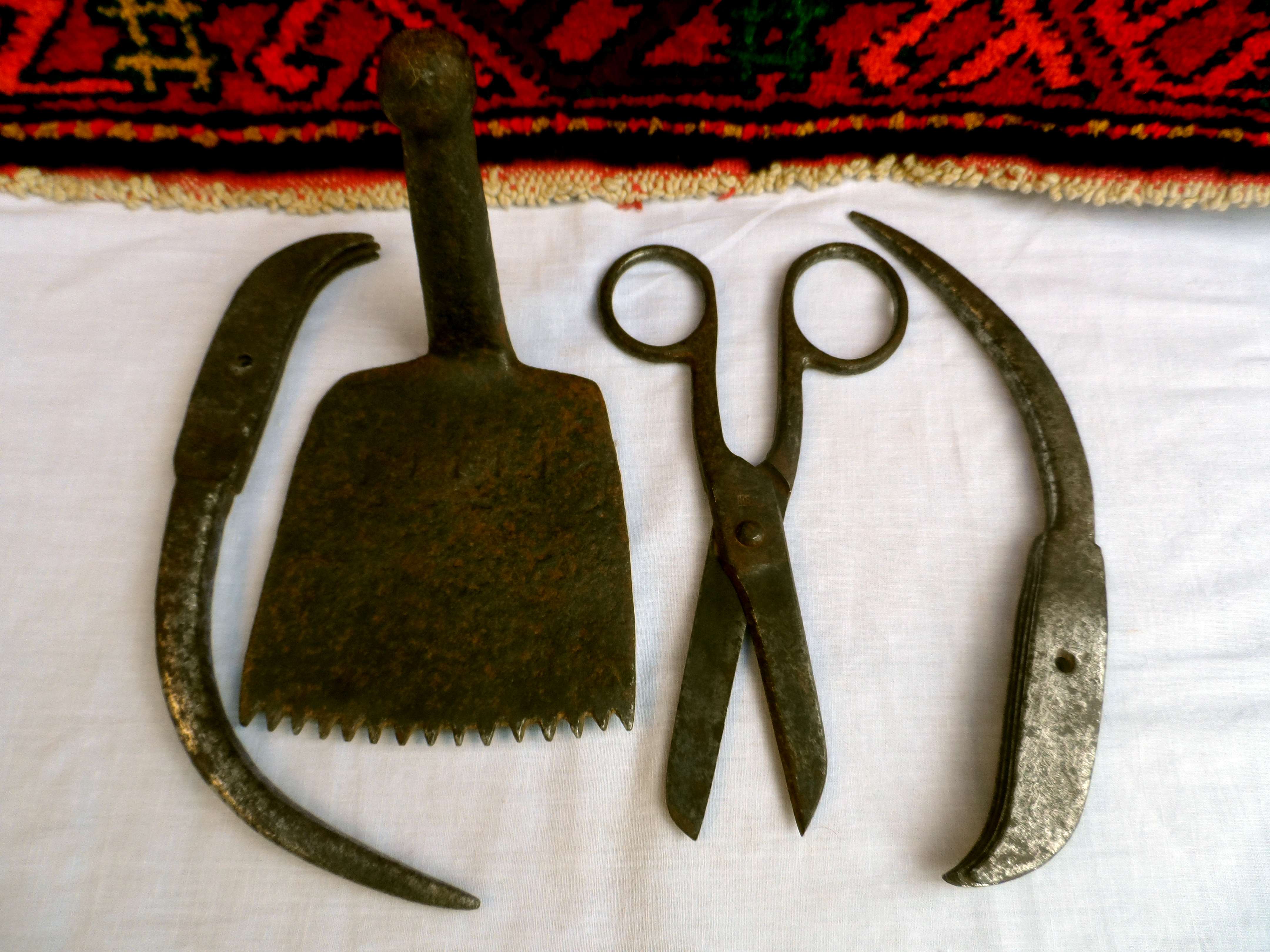 Xalça toxuculuq alətləri — xalça, palaz və digər xalça məmulatlarını toxuyarkən istifadə edilən müxtəlif alətlər.